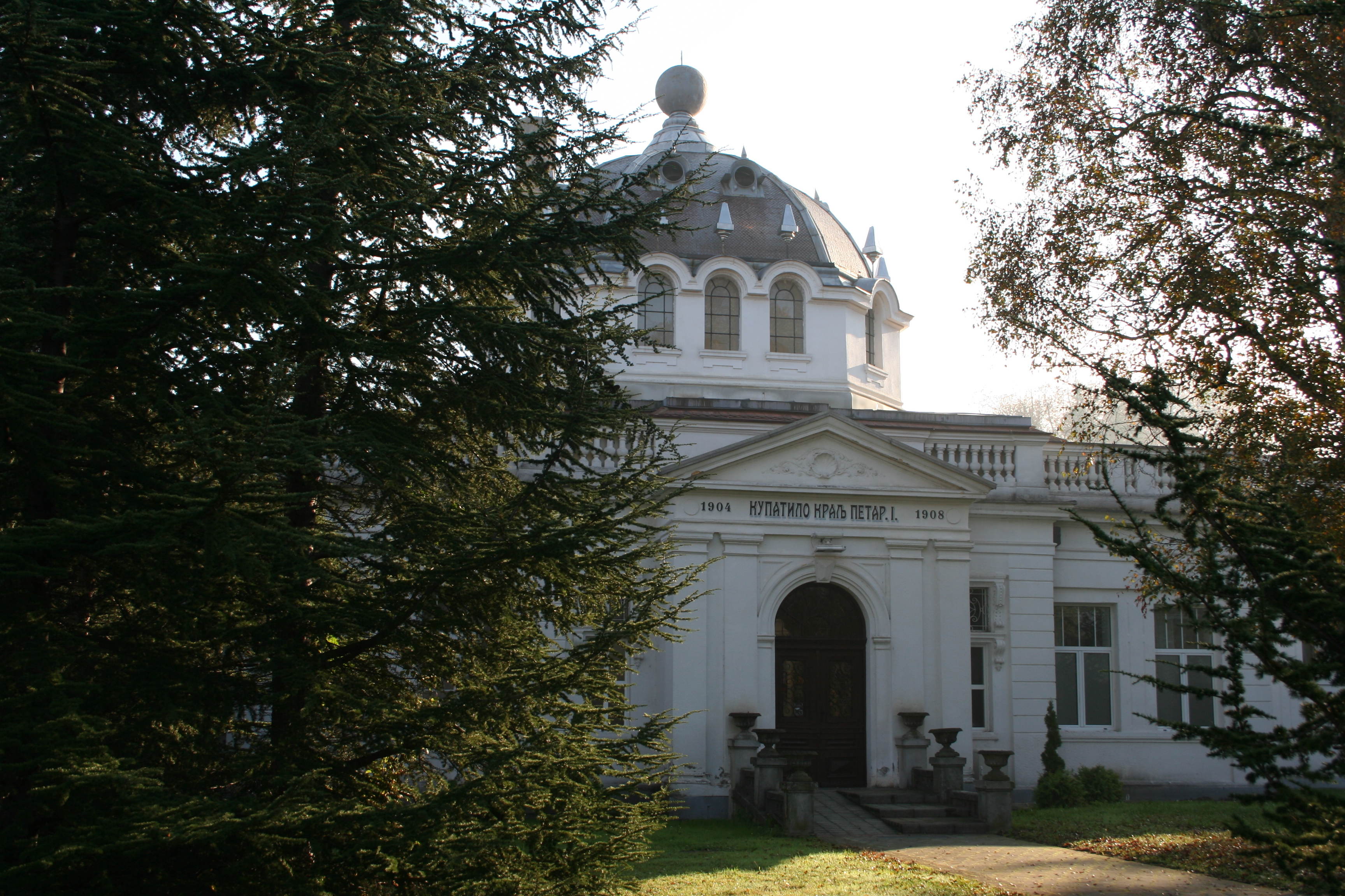 Specijalna bolnica za rehabilitaciju Banja Koviljača